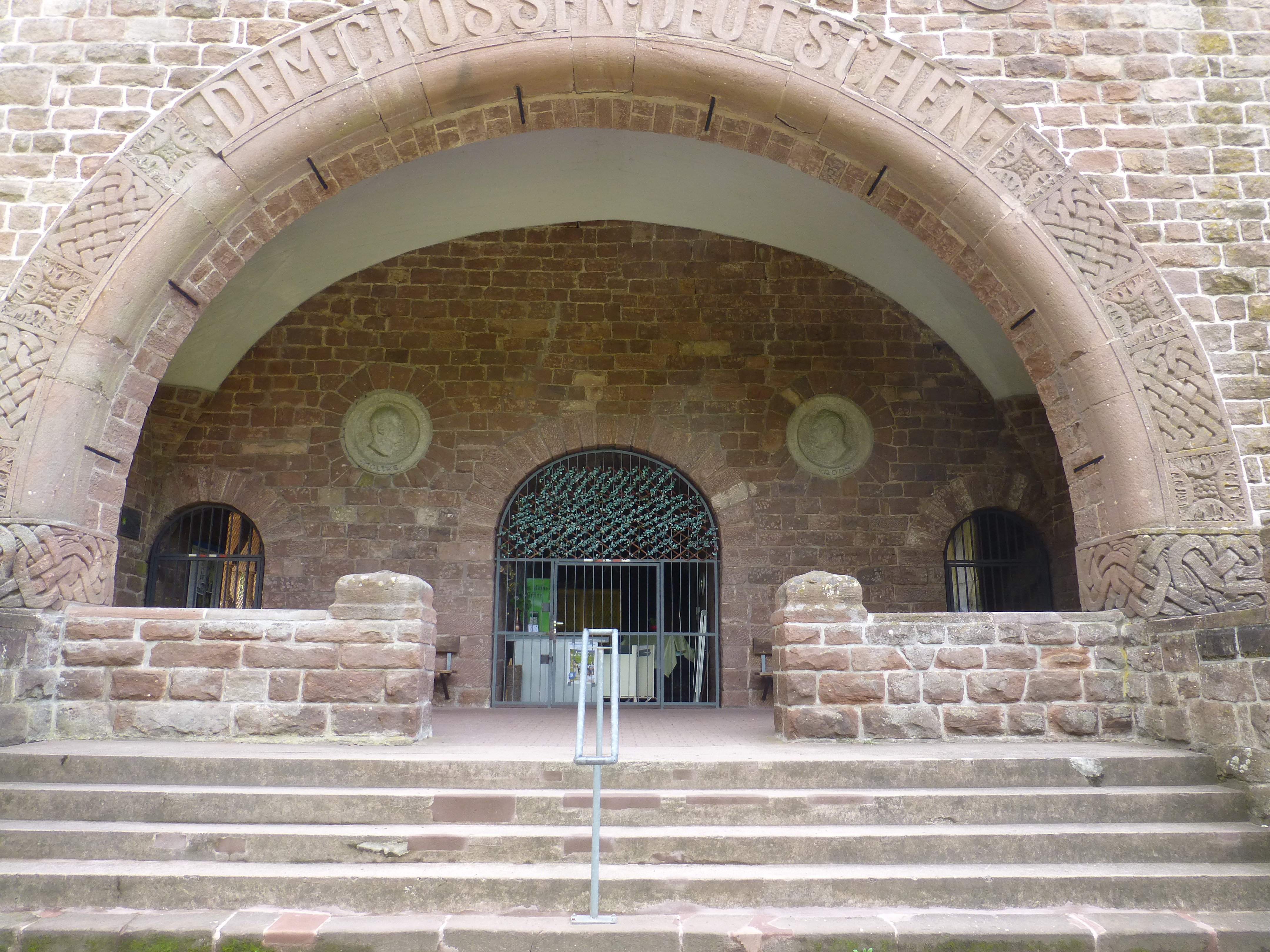 Bismarckturm (Kallstadt), Ostseite mit heutigem Zugang (linke Gittertür)